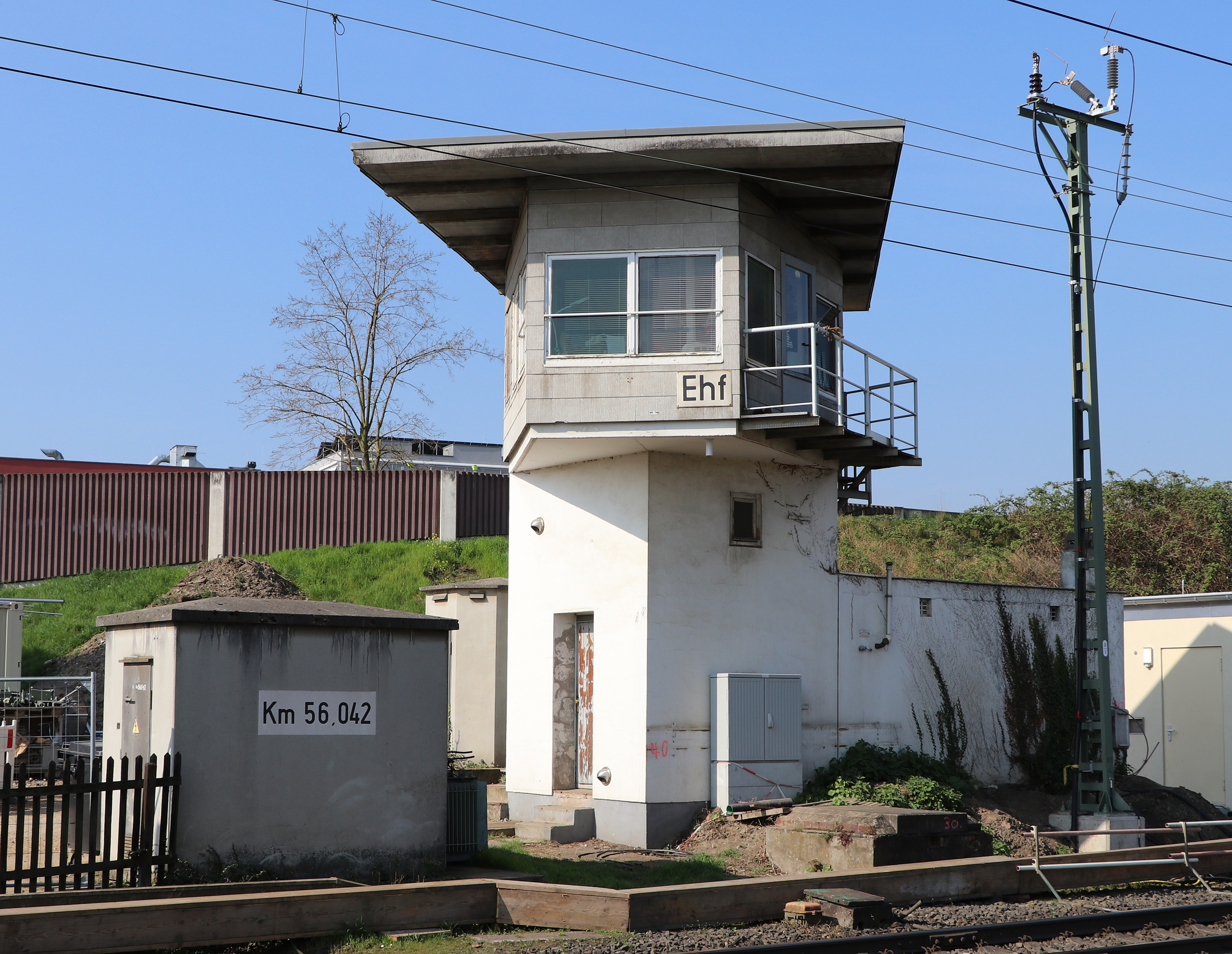 Stellwerk Ehf von der Burgstraße aus gesehen.